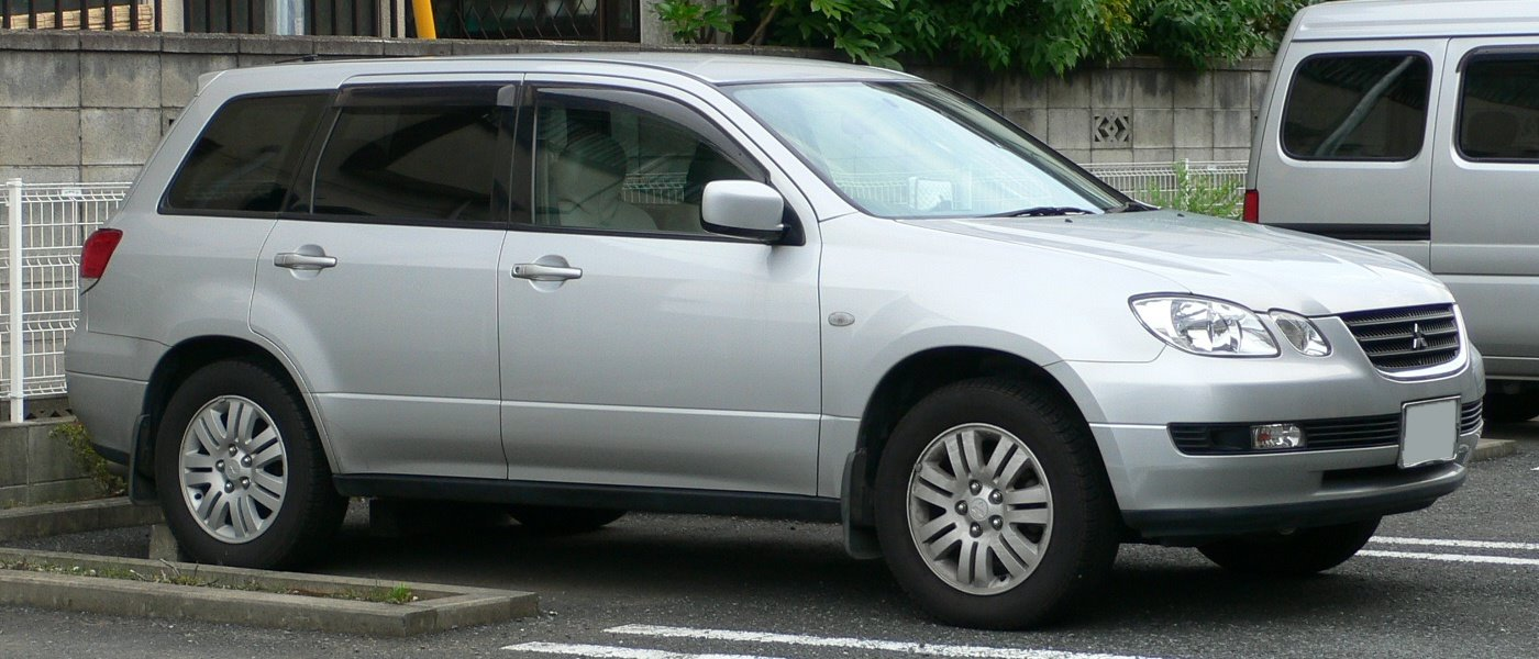 Mitsubishi_Airtrek (2001 - 2002)